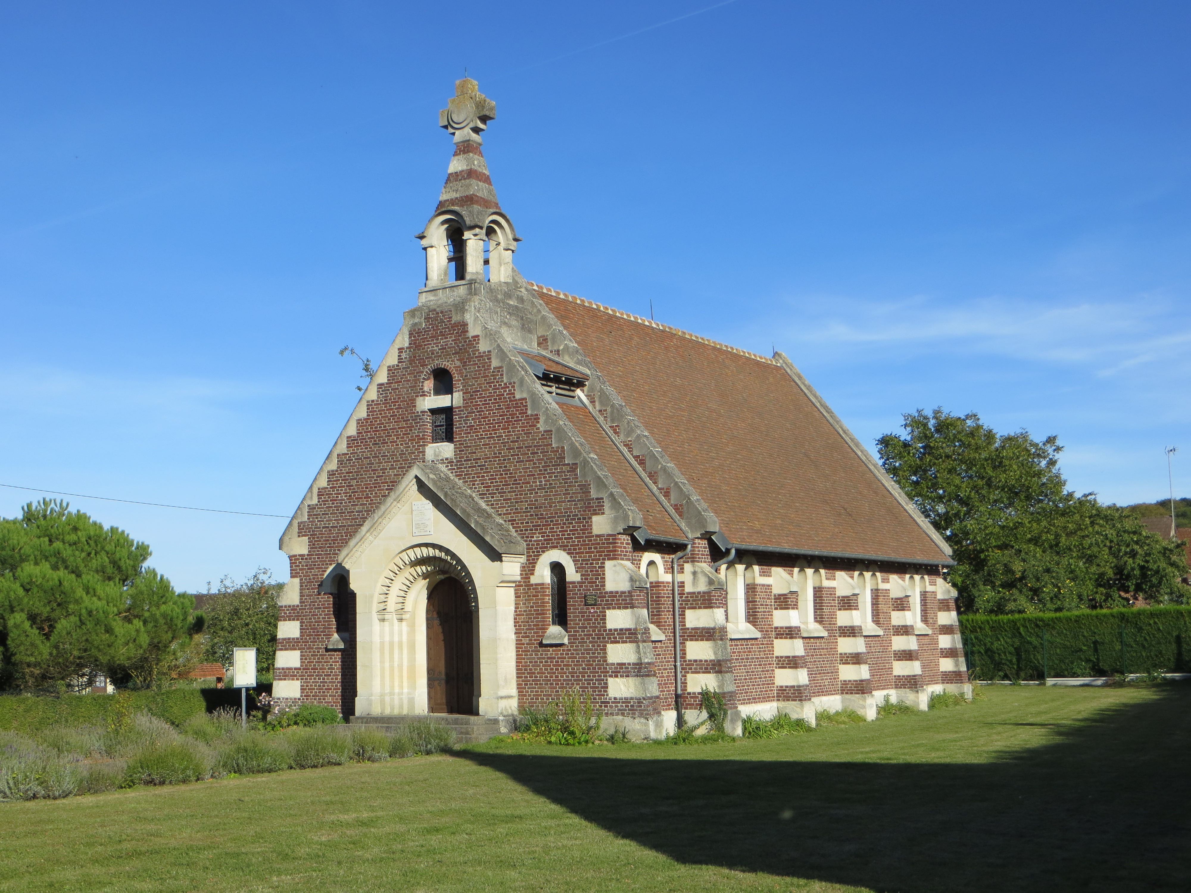 Vue générale de l'église